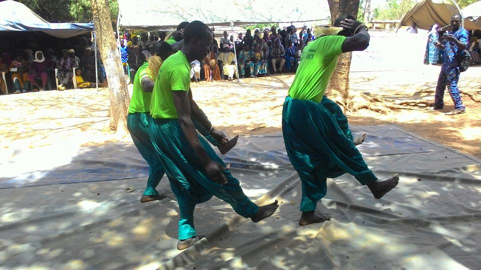 Au nord du Benin la culture traditionnelle passe avant toute autre chose.